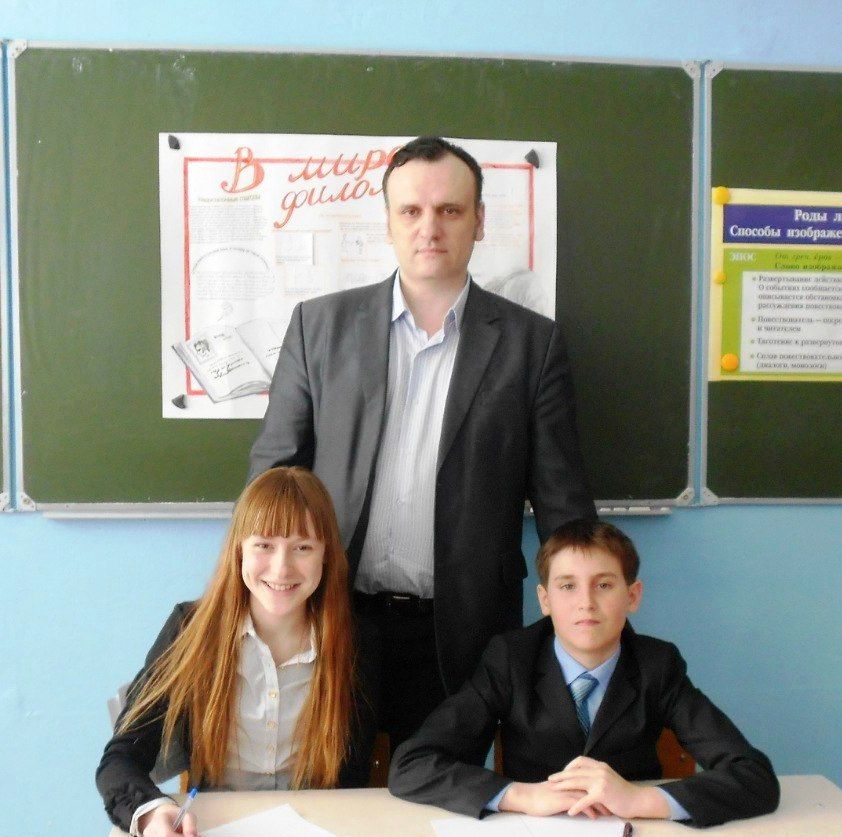 Аркадий Викторович Тедиков. Преподаватель русского языка и литературы. "Учитель-исследователь-2012". Высшая категория.